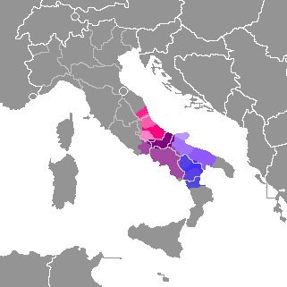 Variedades meridionales de las lenguas italianas